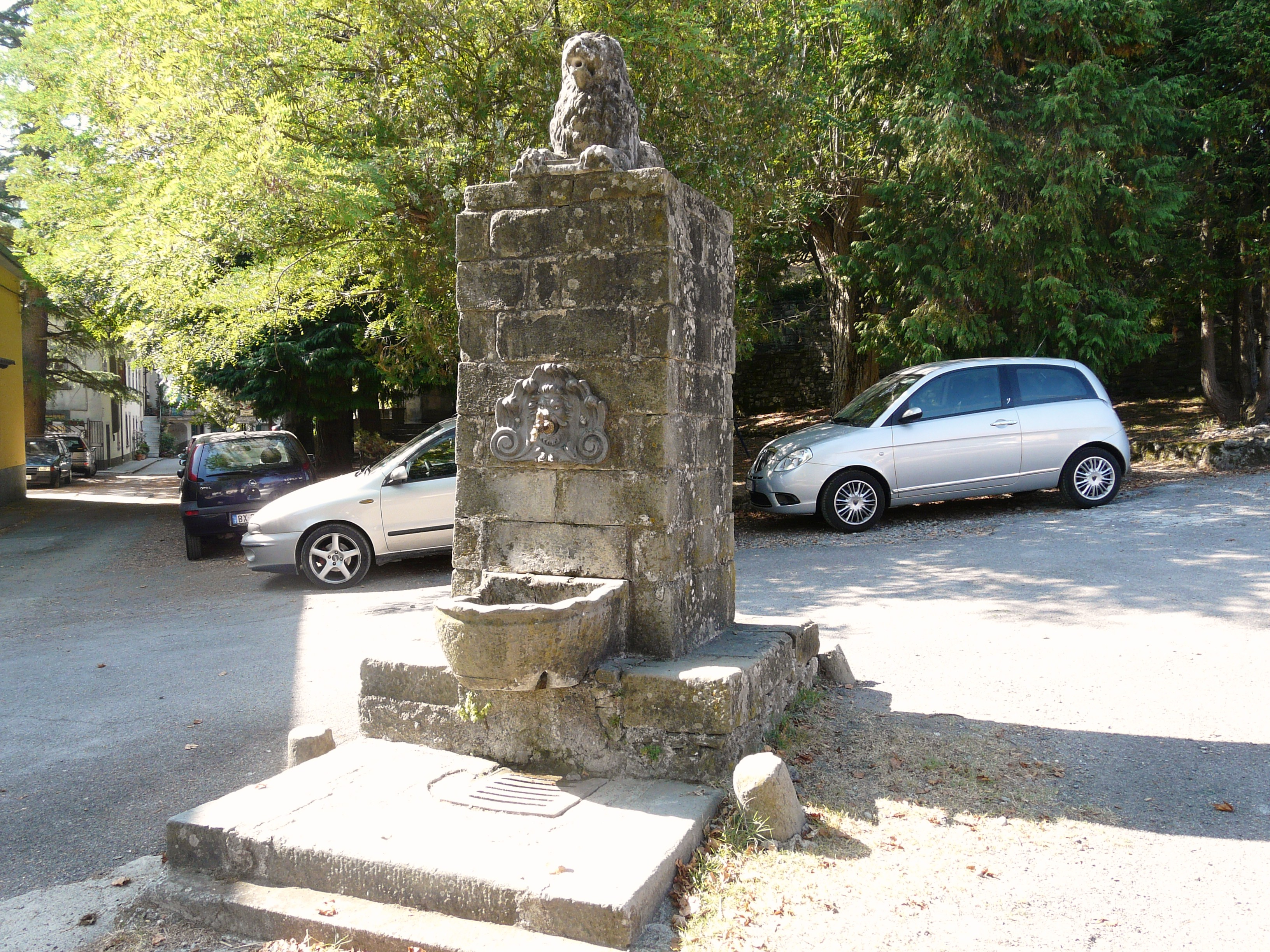 Fontana, Calice al Cornoviglio, Liguria, Italia